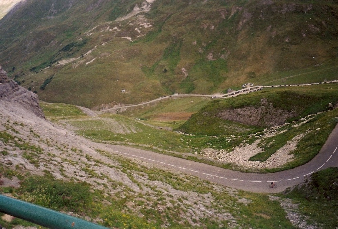 Plan Lachat vu des lacets plus haut